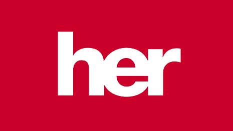 Logotipo de la película Her, dirigida por Spike Jonze en 2013.